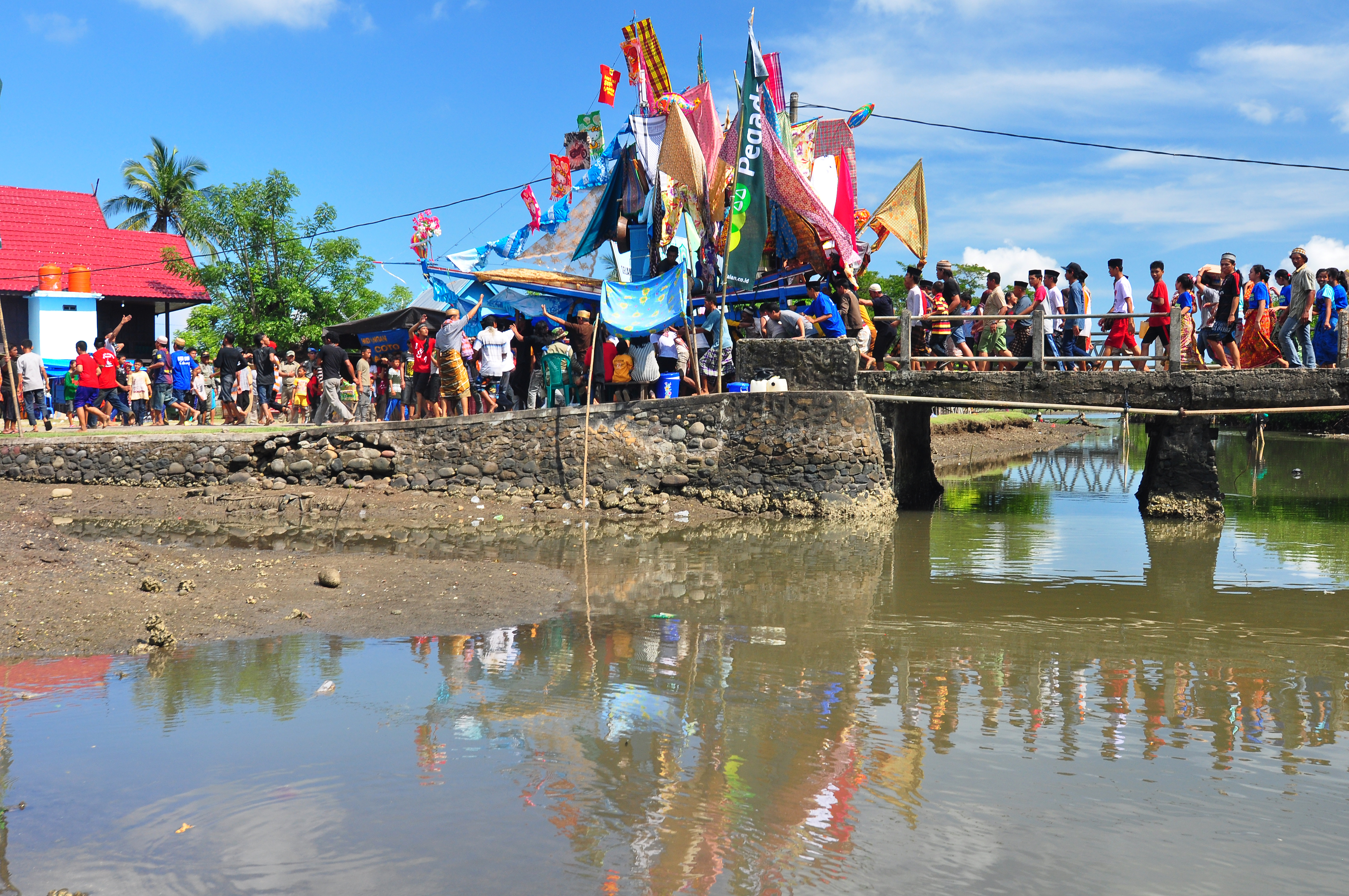 Perahu (julung-julung) yang sudah dihias diangkut dengan gotong royong menuju sungai Cikoang